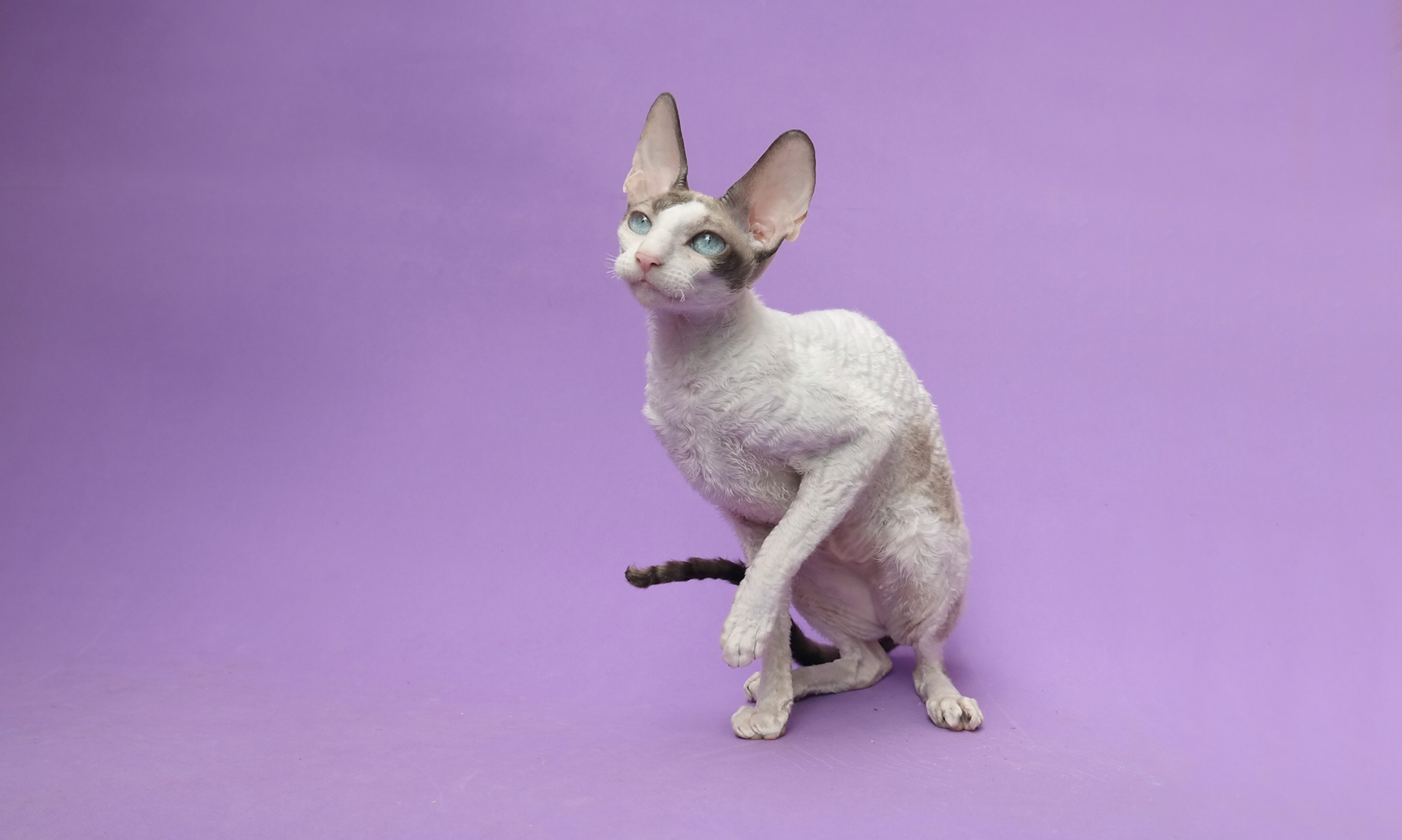 Cornish Rex Nome BR* Segata Frida Cor: Chocolate Point Arlequin